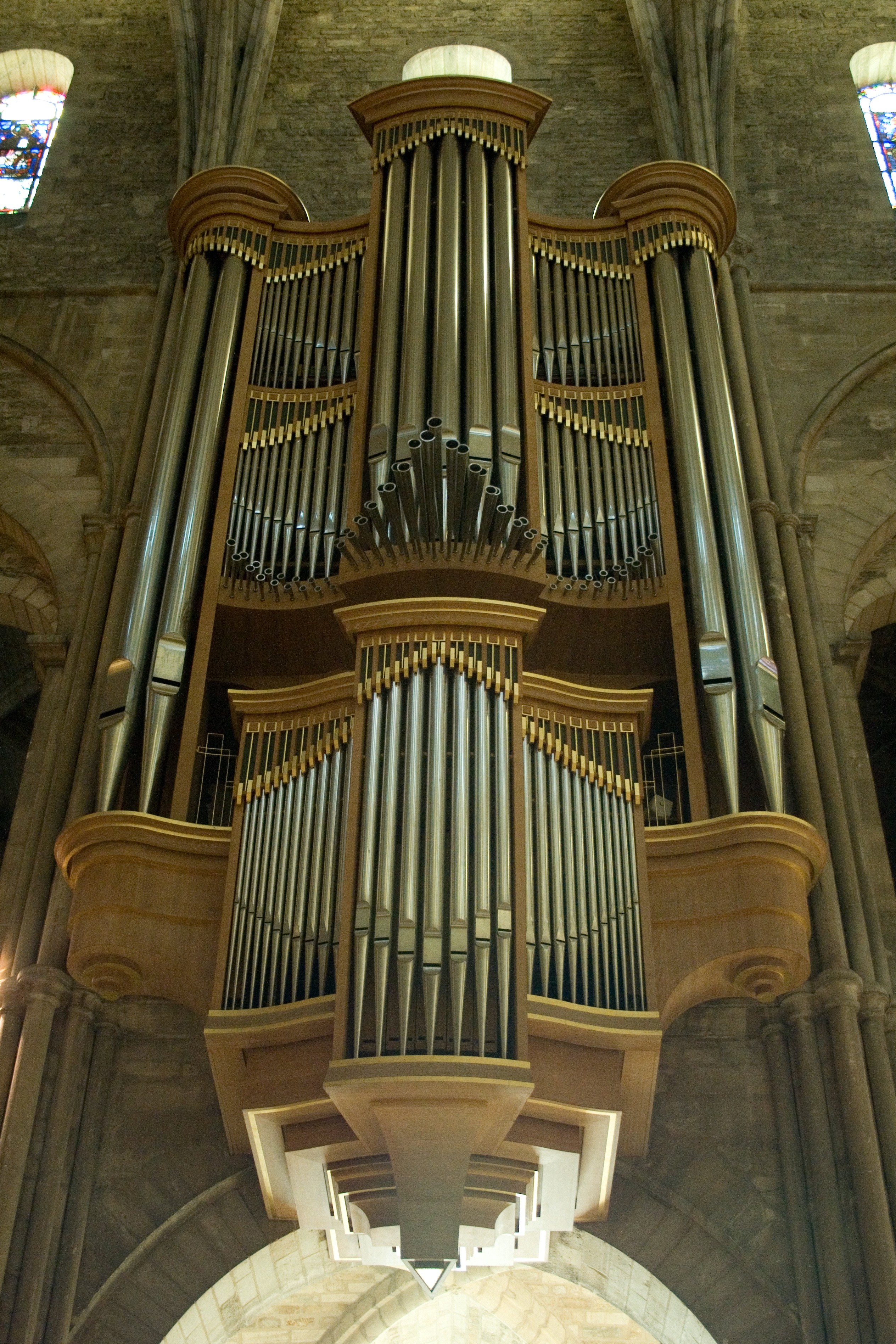 Orgue de la Basilique Saint-Remi à Reims